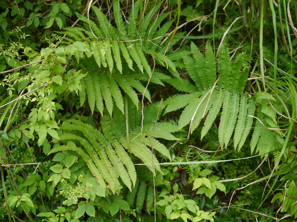 Pentarhizidium orientale：イヌガンソク 2015/08/09 和歌山県田辺市：Tanabe City. Wakayama Pref. Japan